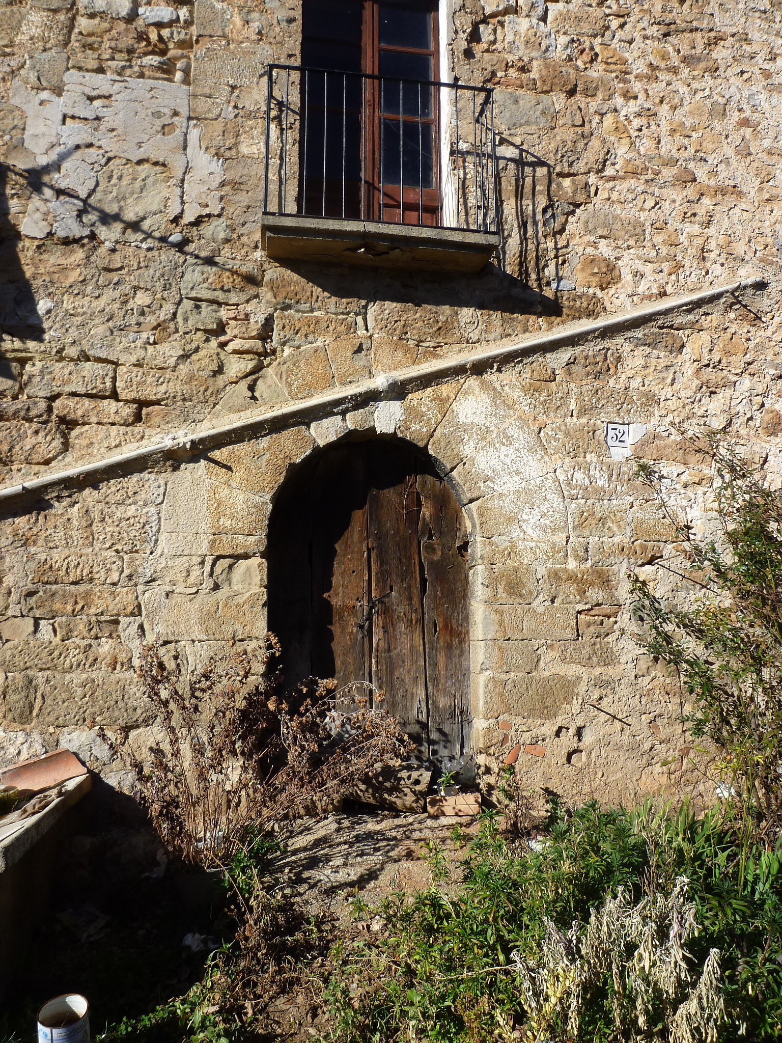 Can Costa o la Casa Nova de Canalda (Odèn): portal adovellat